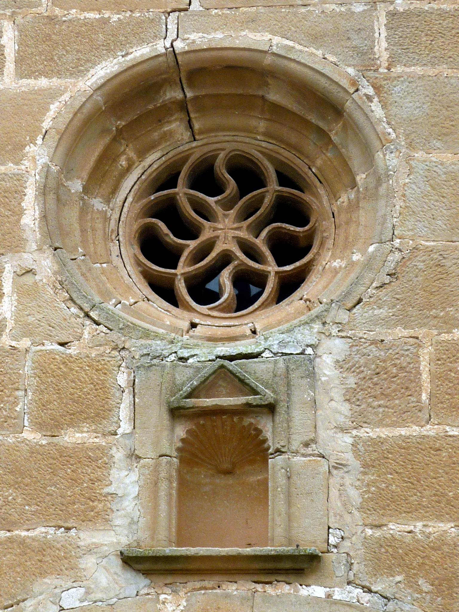 Església parroquial de Sant Ponç de Vall-llebrera (Artesa de Segre): fornícula i òcul